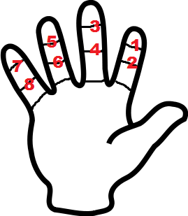 Russian finger through the octal system (Русский пальцевый счёт восьмеричной системы)